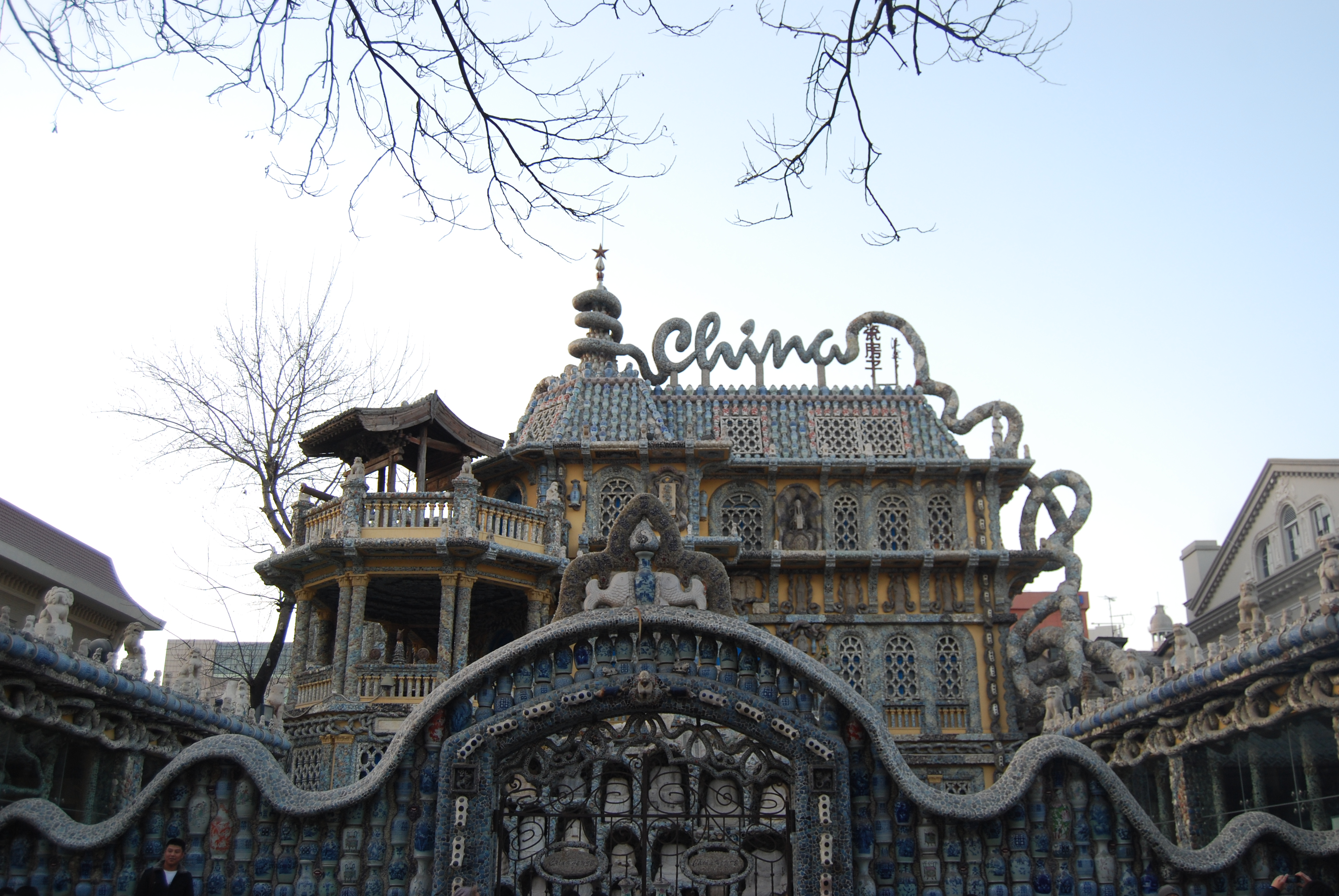 历史风貌建筑